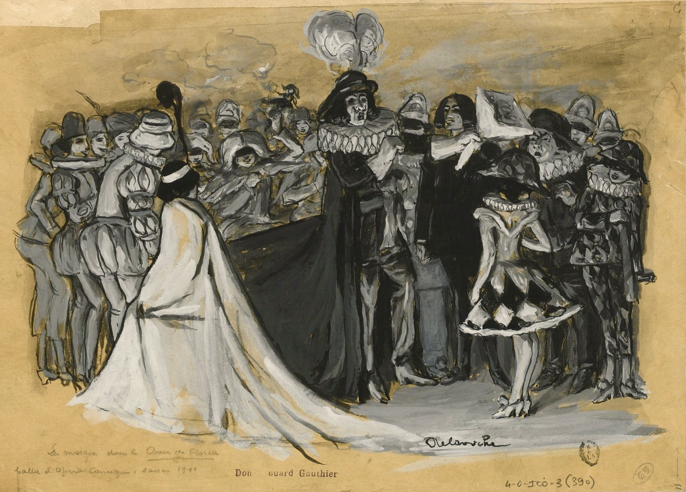 Dessin de Paul-Charles Delaroche, Le coeur de Floria.